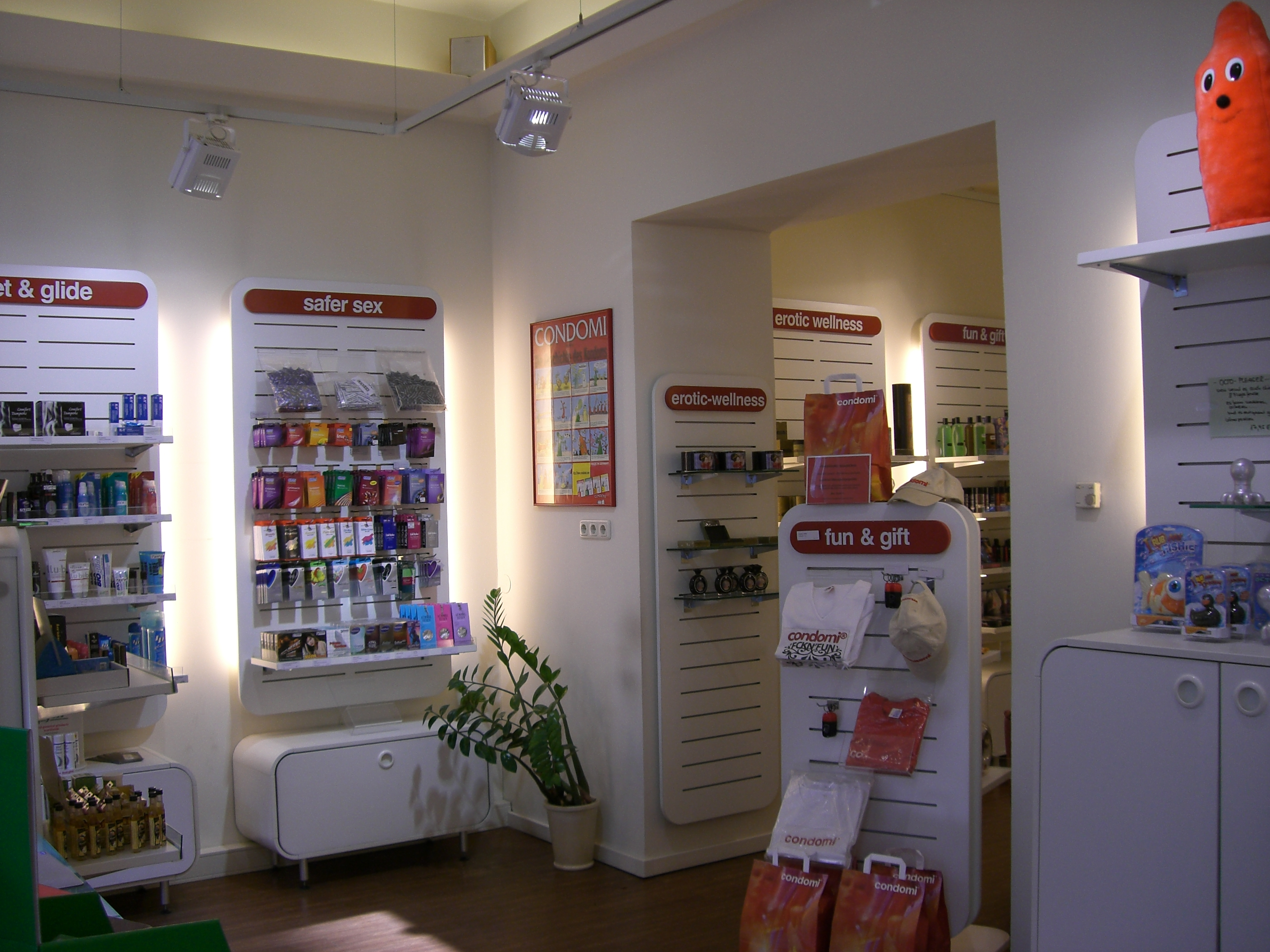 Innenraum des Condomi-Ladengeschäftes in Köln